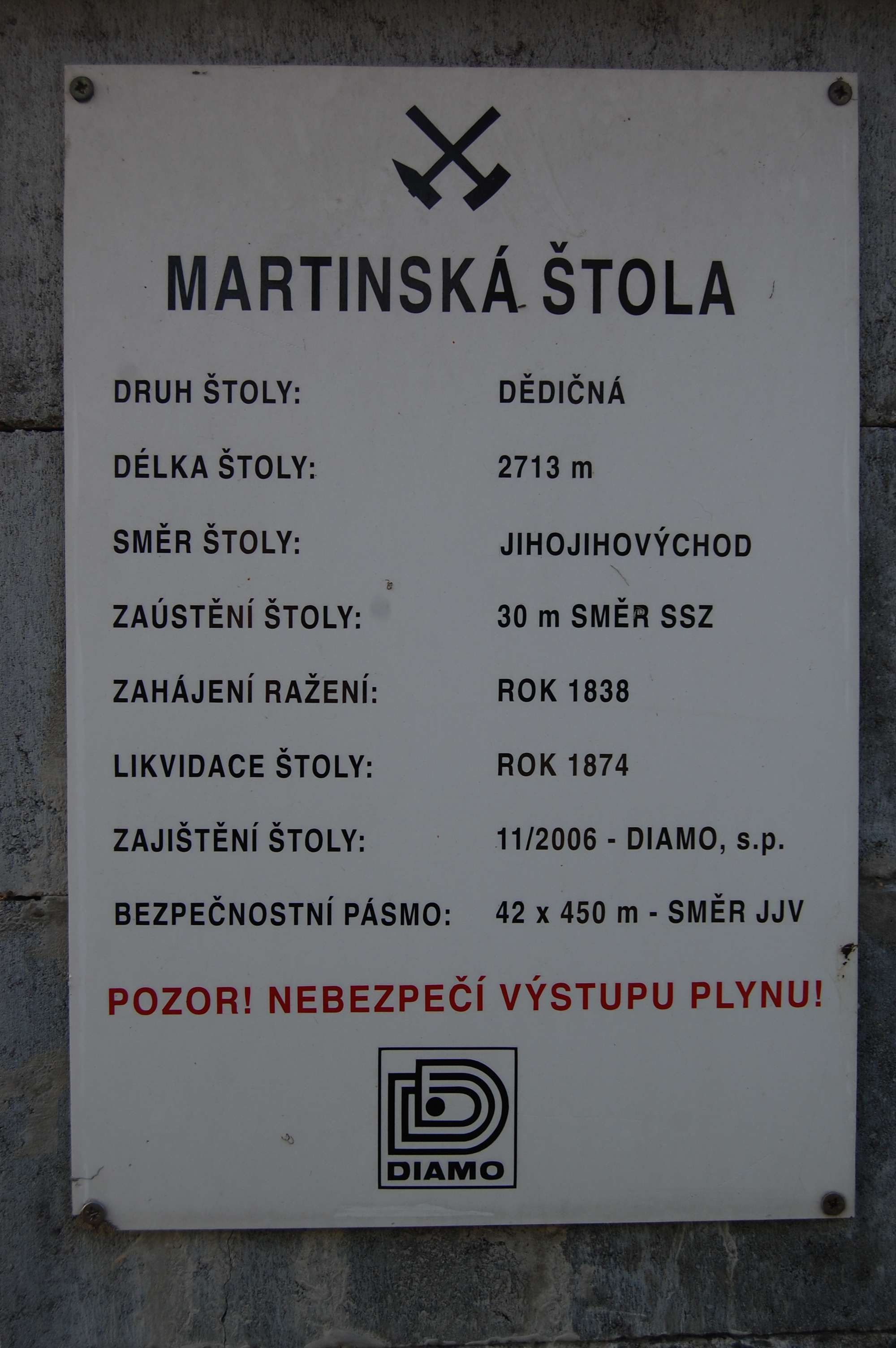 Ústí Martinské dědičné štoly v Rychvaldě, okr. Karviná. Odvodňovací studna štoly